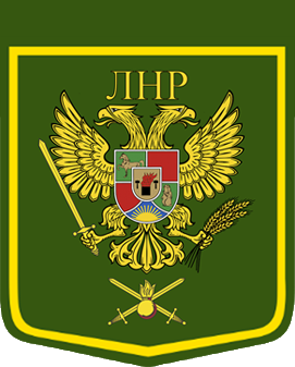 Эмблема Народной милиции Луганской Народной Республики